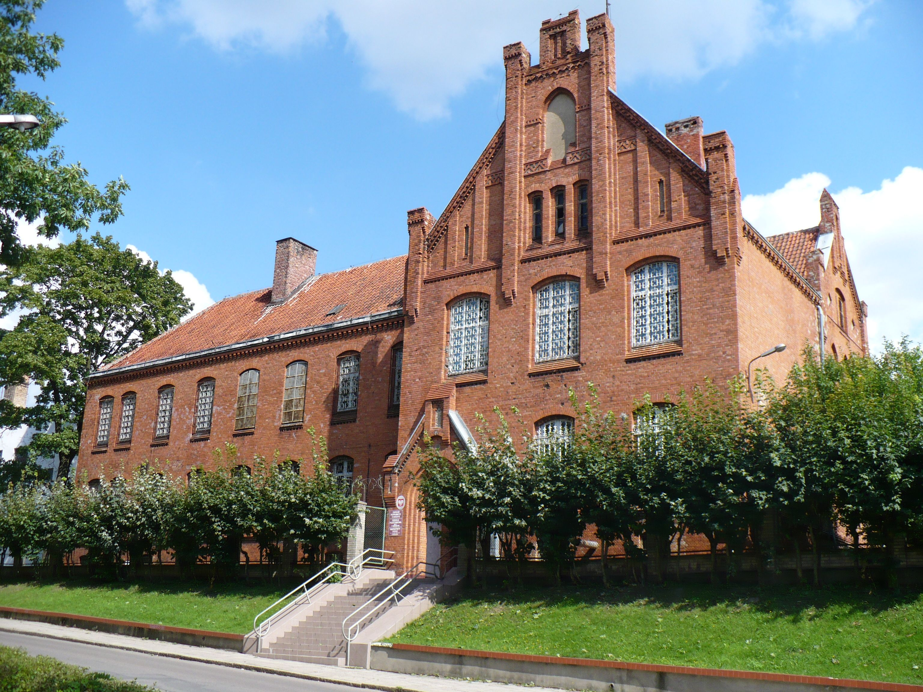 Zakład Poprawczy w Barczewie